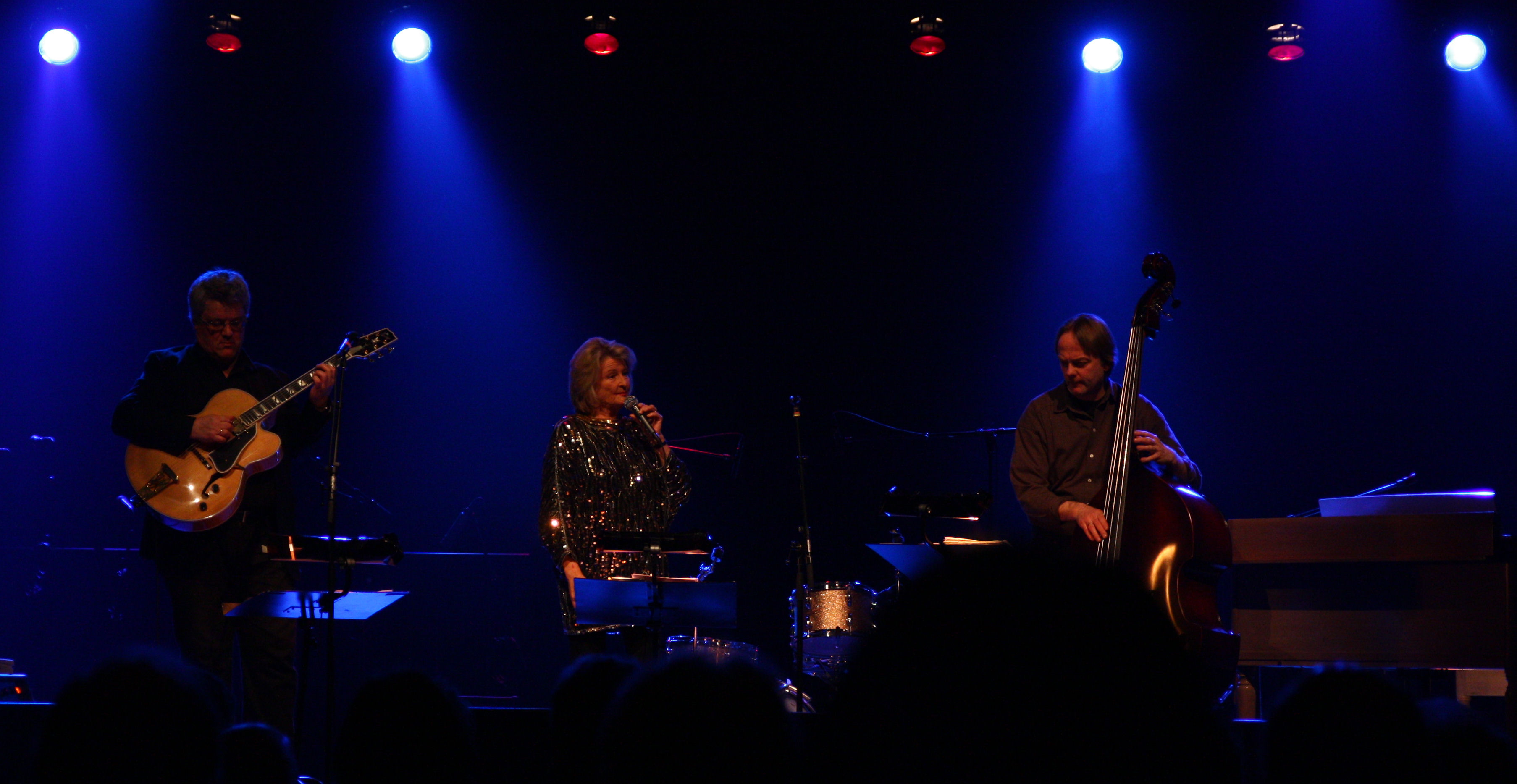 Karin Krog, Ribbejazz 2009